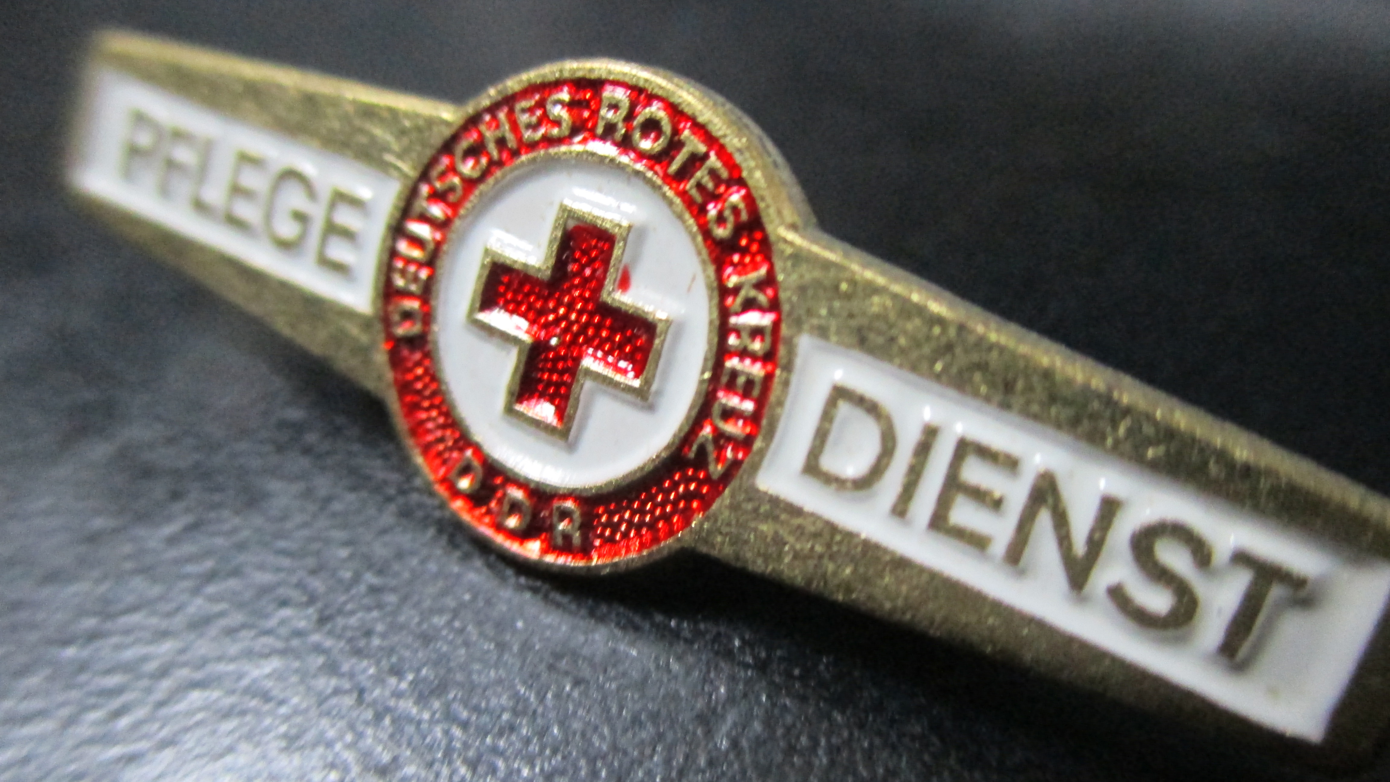 Ehrenzeichen des DRK der DDRi_ Pflege Dienst_in GOLD